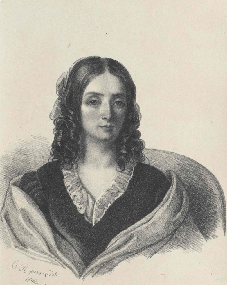 Графиня Софья Александровна Голенищева-Кутузова, ур. Рибопьер (1813—1881)